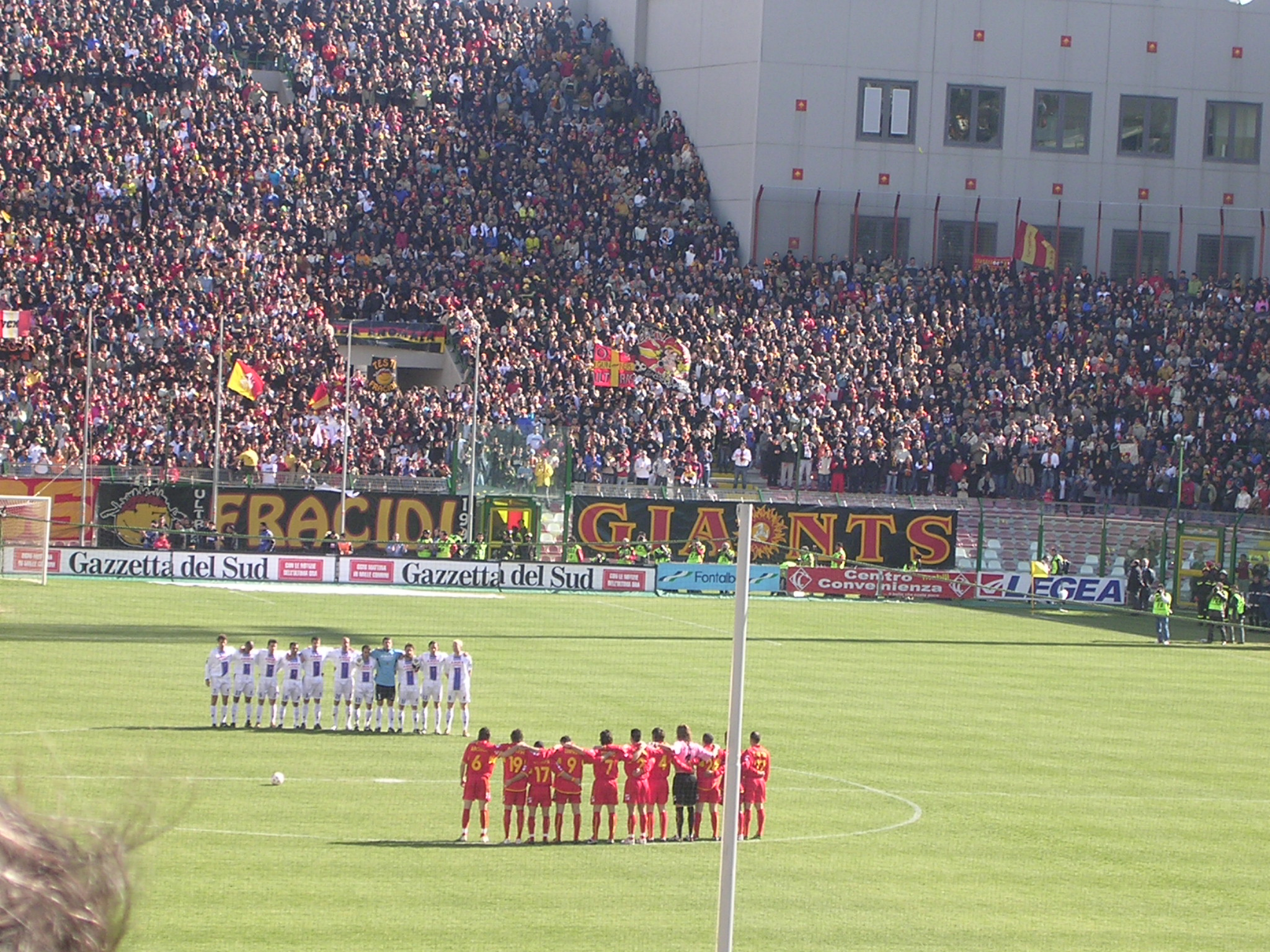 Dettaglio giocatori del Messina(Messina-Bologna). Foto personale. Messina 2005